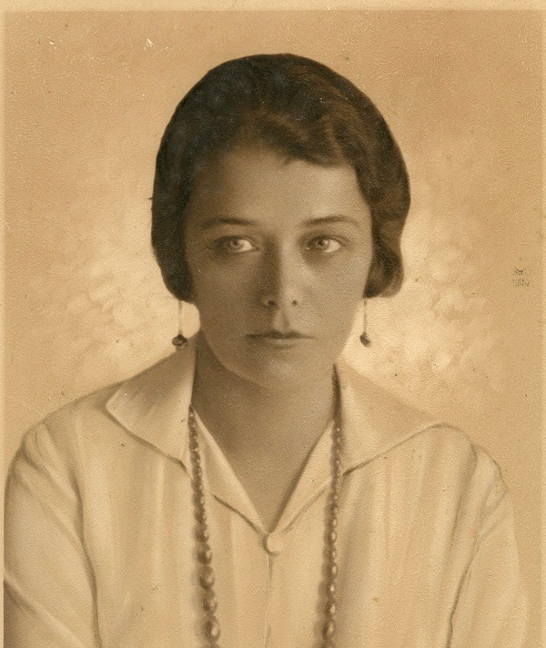 Gräfin Ilona Andrássy, Enkelin von Gyula Andrássy im Alter von etwa 20 Jahren